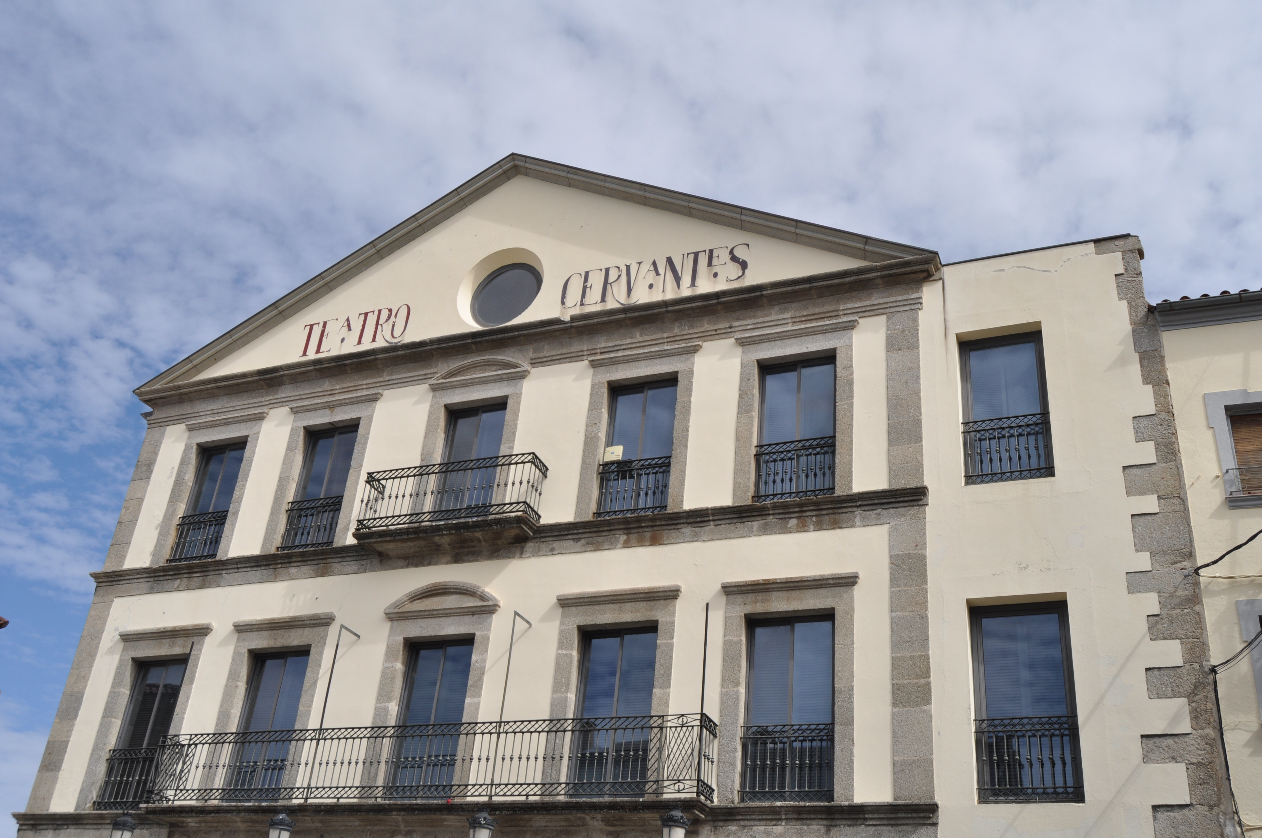 Bejar - 055